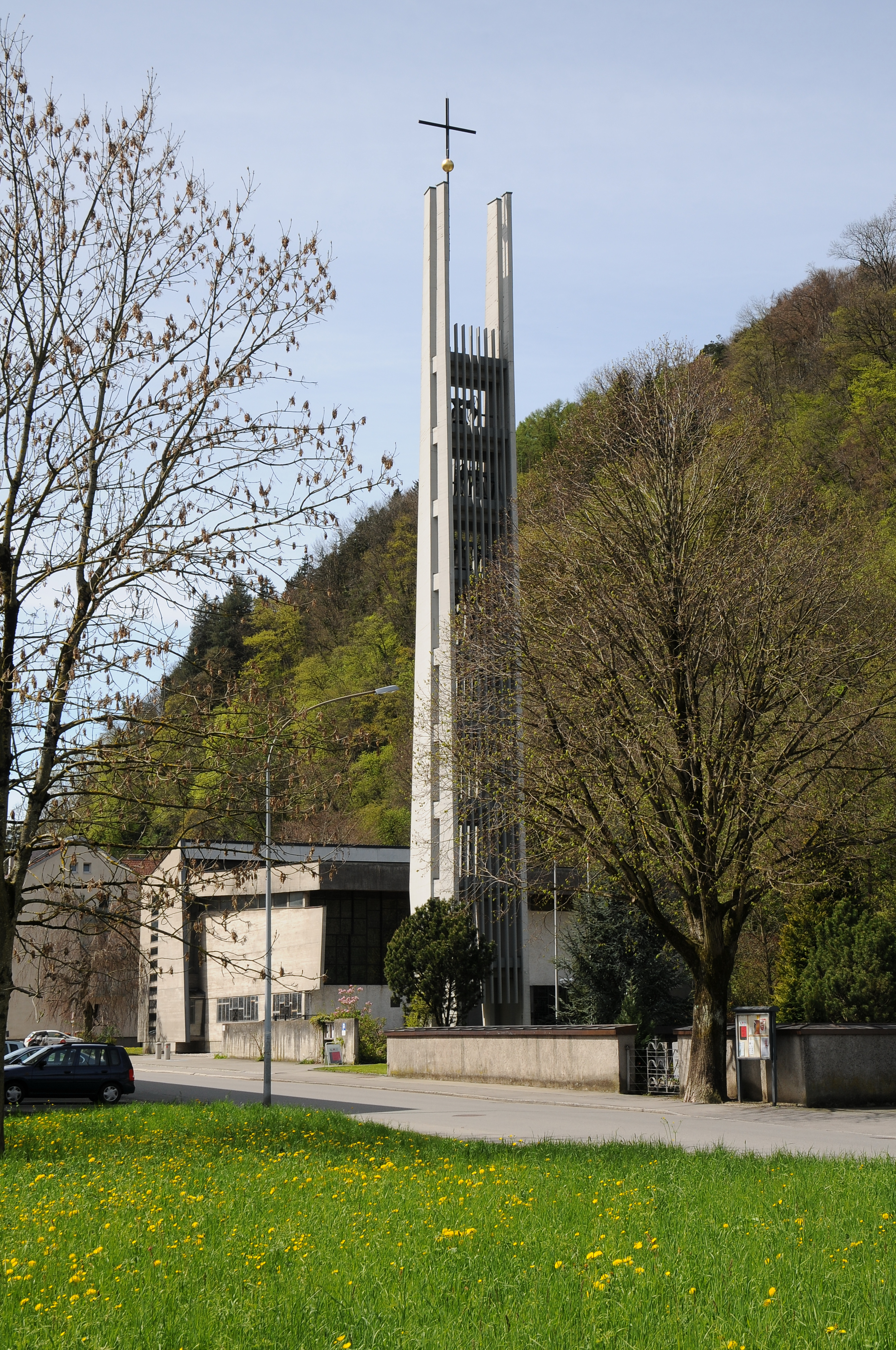 Pfarrvikariatskirche Maria Königin des Friedens, Mutterstraße 71, Altenstadt in Feldkirch, Vorarlberg.